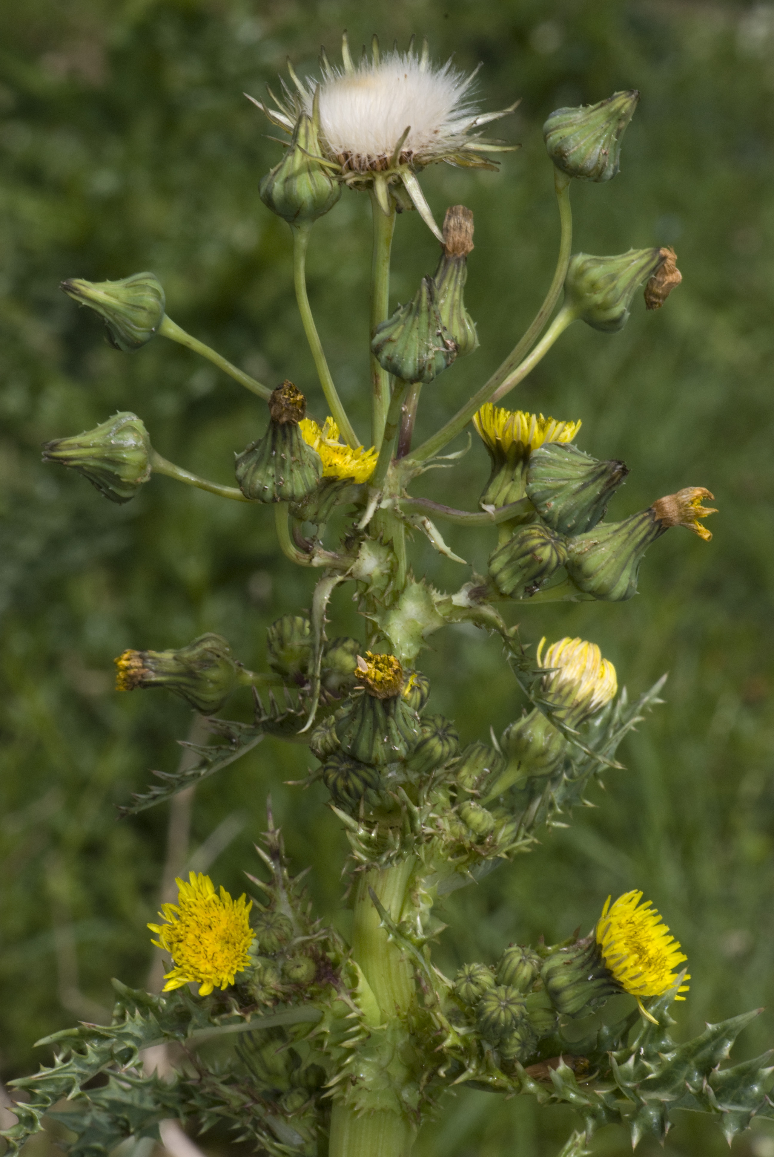 Sonchus asper Saint-Fuscien (Somme), France